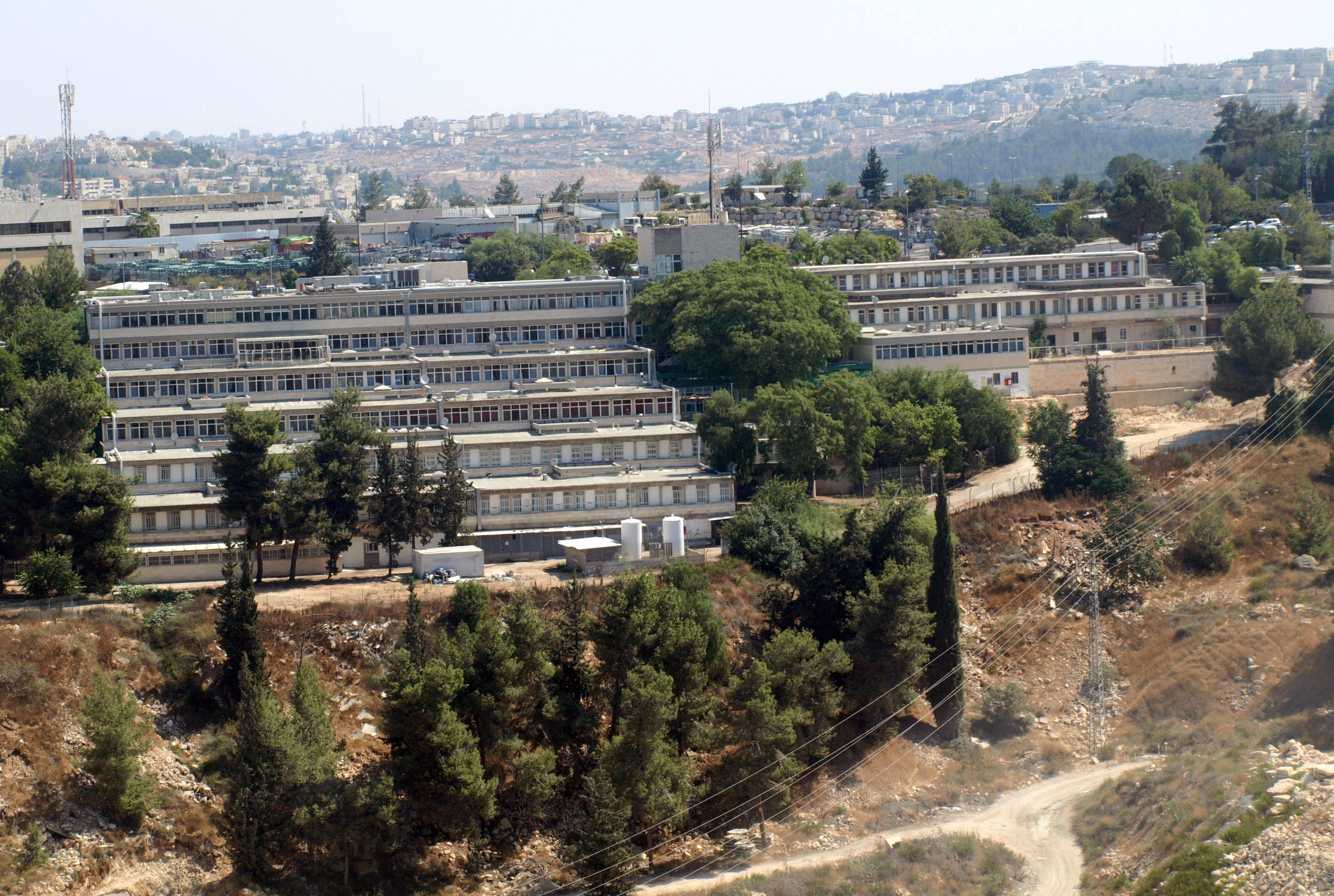 בית החולים הרצוג 2010